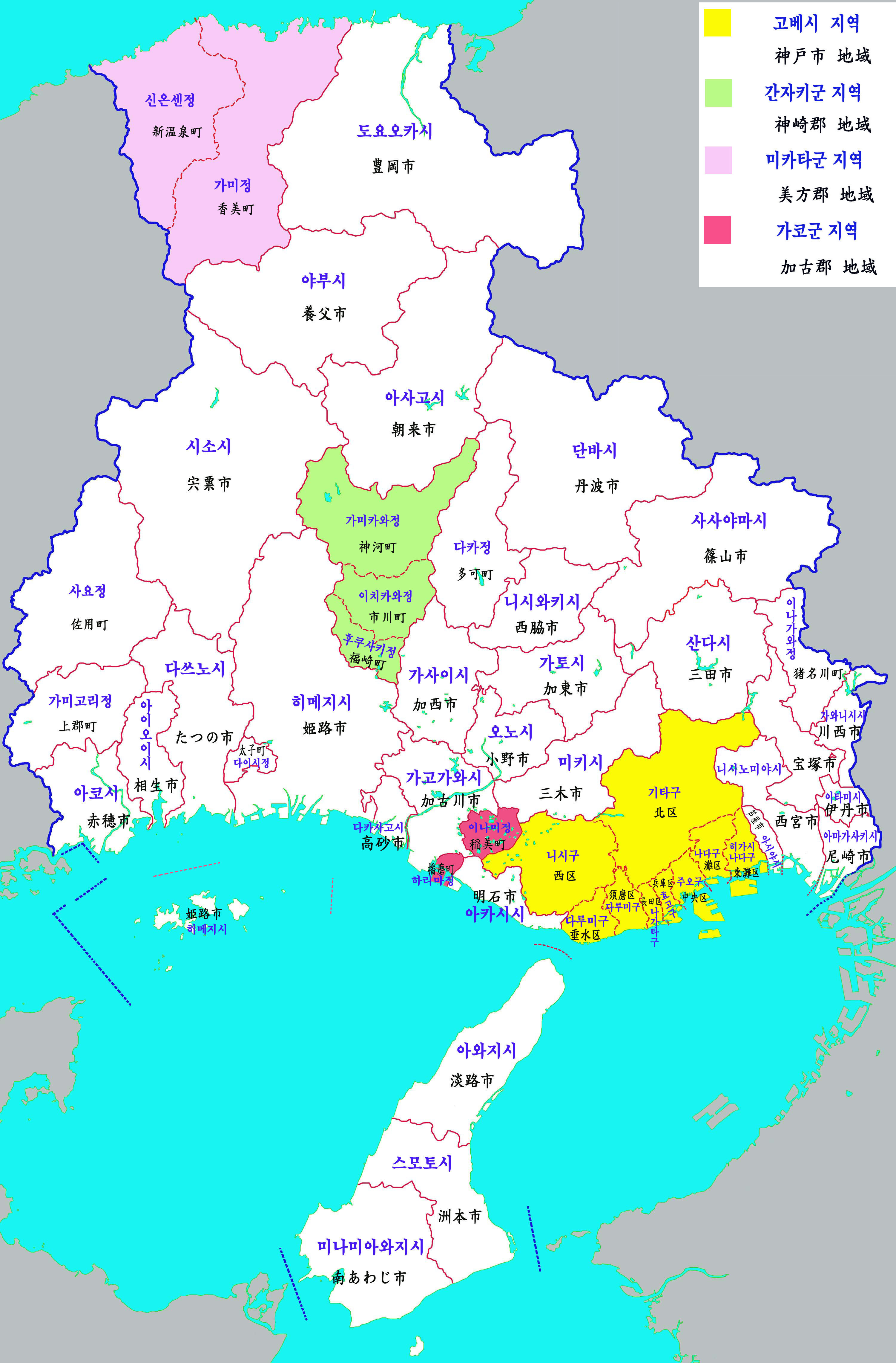 효고현 행정구역